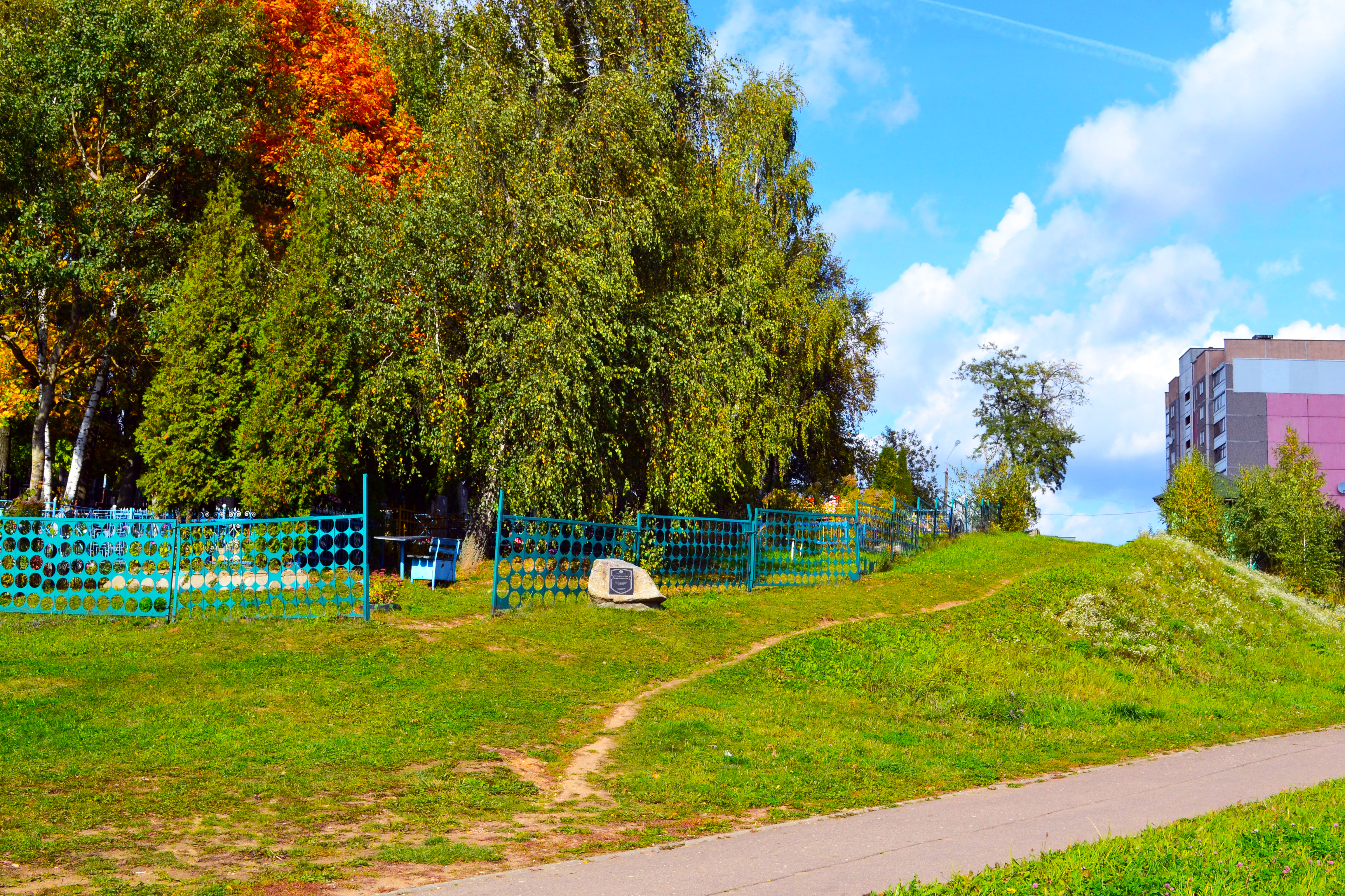 Беларуская (тарашкевіца): Курганны могільнік у менскім мікрараёне Сухарава, на скрыжаваньні вул. Янкоўскага з вул. Р. Шырмы This is a photo of Belarusian heritage monument. Reference number: 713В000245 ( WLM)